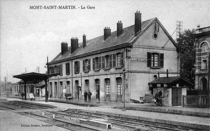 Quais et bâtiment voyageurs de la gare au début des années 1920.